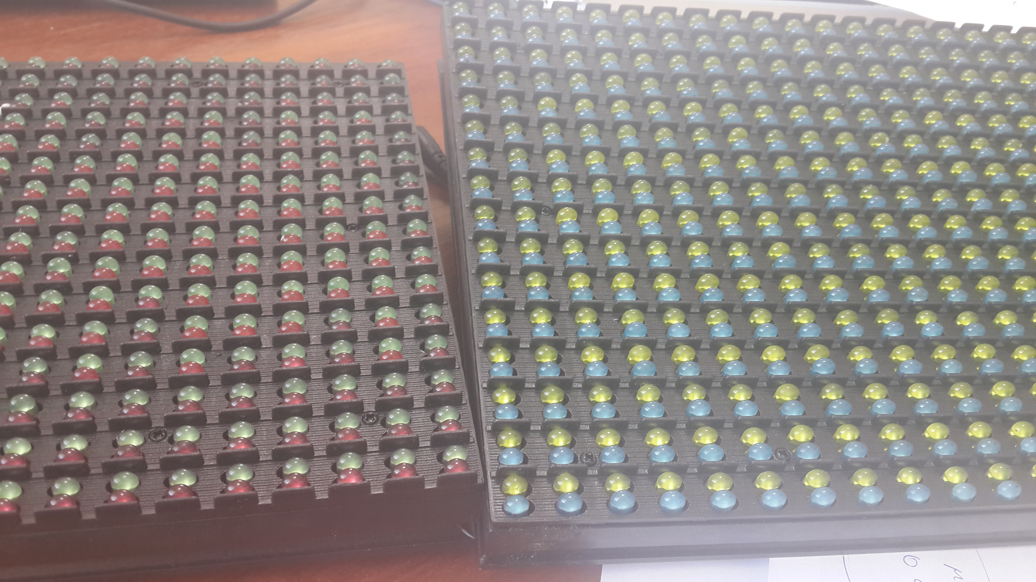 Бело-красный и сине-зелёные модули